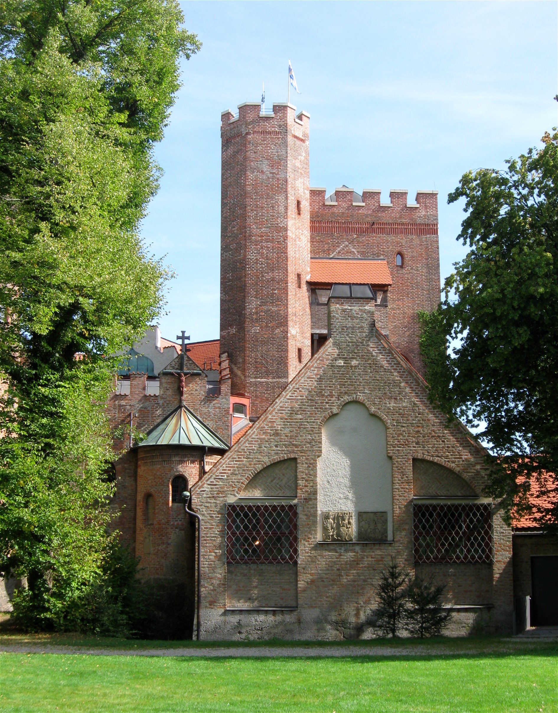 Burg Schwaneck, Pullach